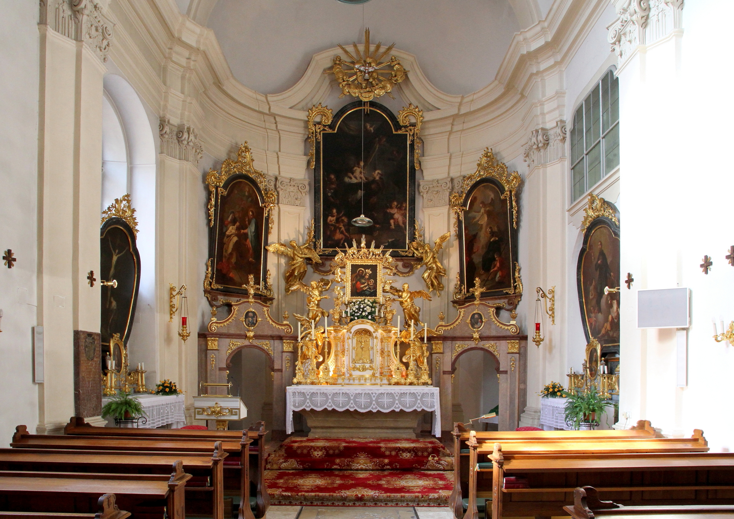 Innenansicht der Spitalskirche hl. Antonius in der burgenländischen Stadt Eisenstadt.